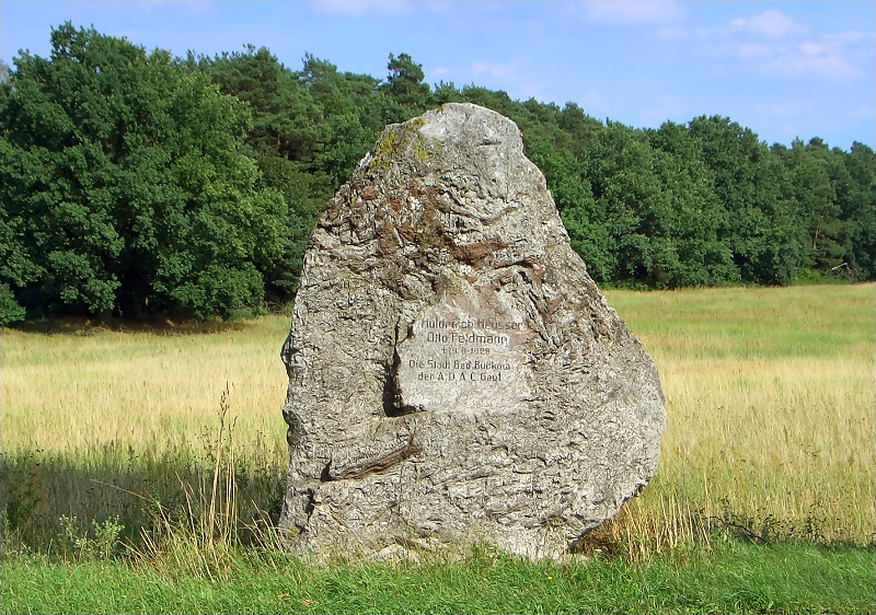 Gedenkstein für Huldreich Heusser und Otto Feldmann an der L35 bei Bollersdorf